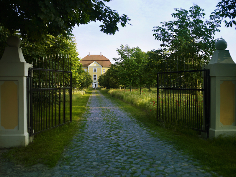 Jagdschloss Quitzin Zufahrt